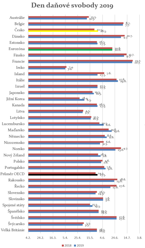 Den daňové svobody 2019 v mezinárodním srovnání